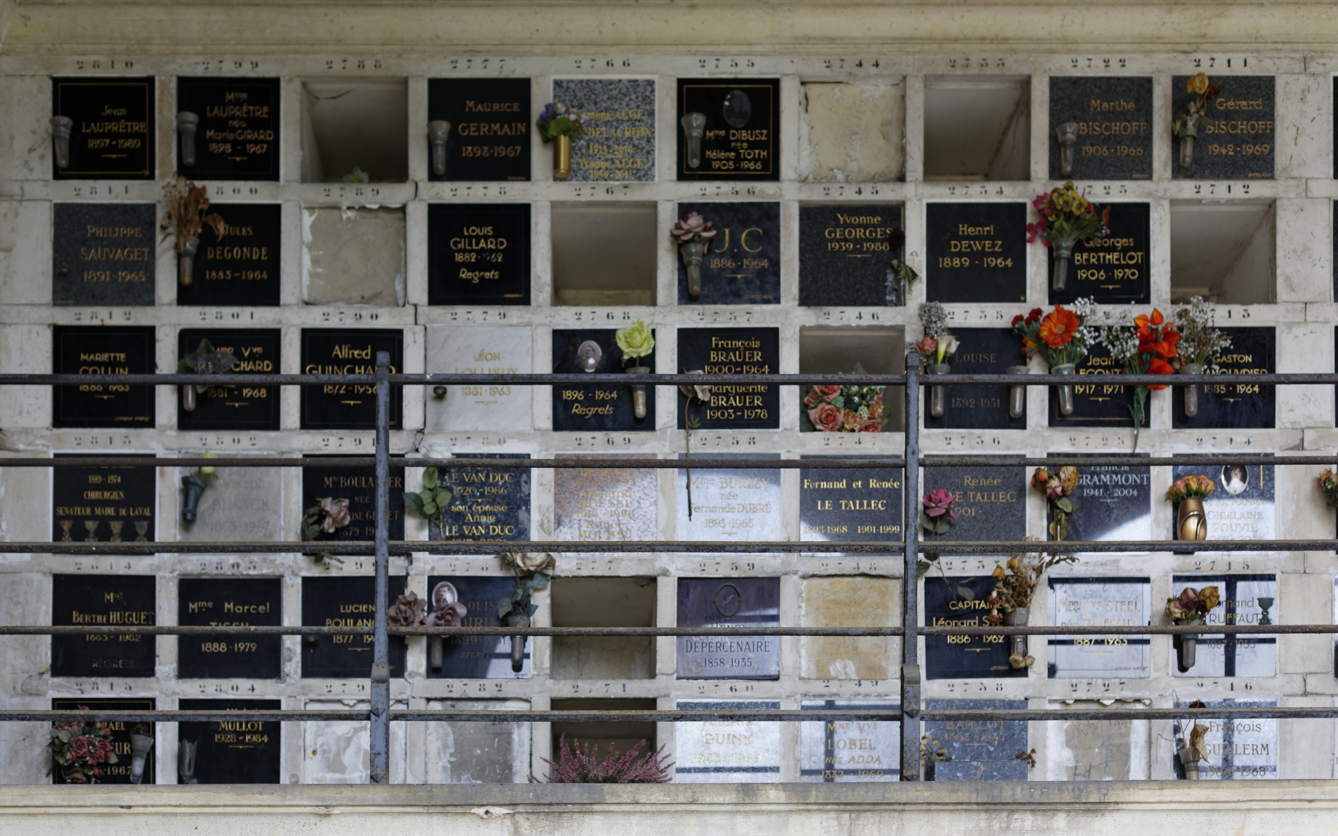 Cases du columbarium du cimetière du Père-Lachaise.